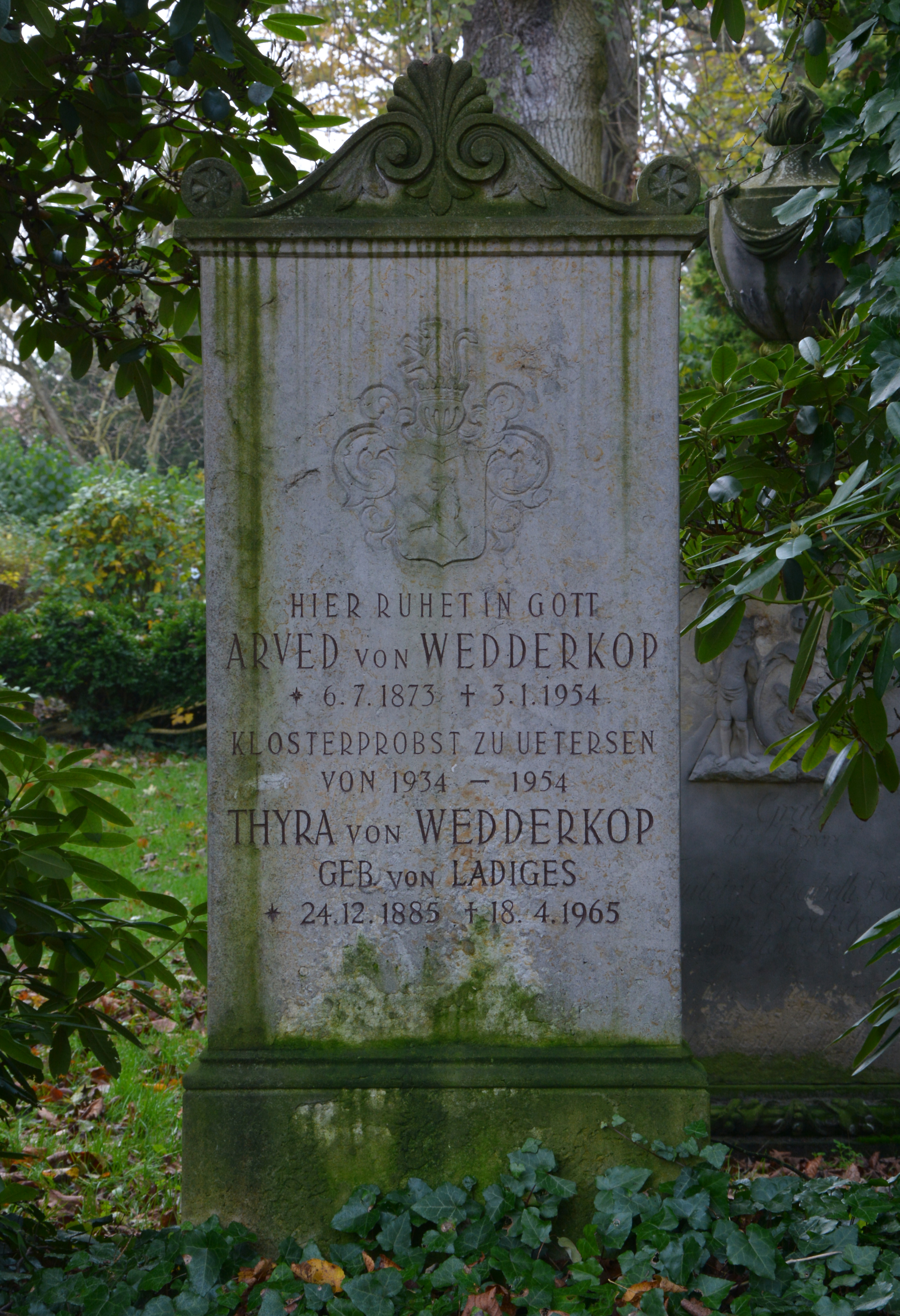 Historischer Grabstein von Arved von Wedderkop (* 6. Juni 1873; † 3. Januar 1954 in Uetersen) Major, Regierungsrat, Klosterpropst zu Uetersen und Politiker und dessen Ehefau Thyra geb. von Ladiges (* 24. Dezember 1885; † 18. April 1965)